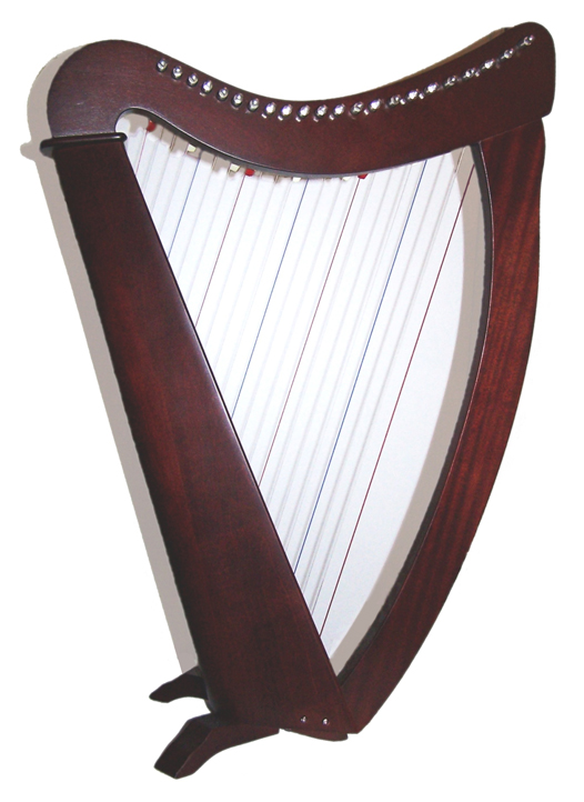 Harpe celtique "troubadour"